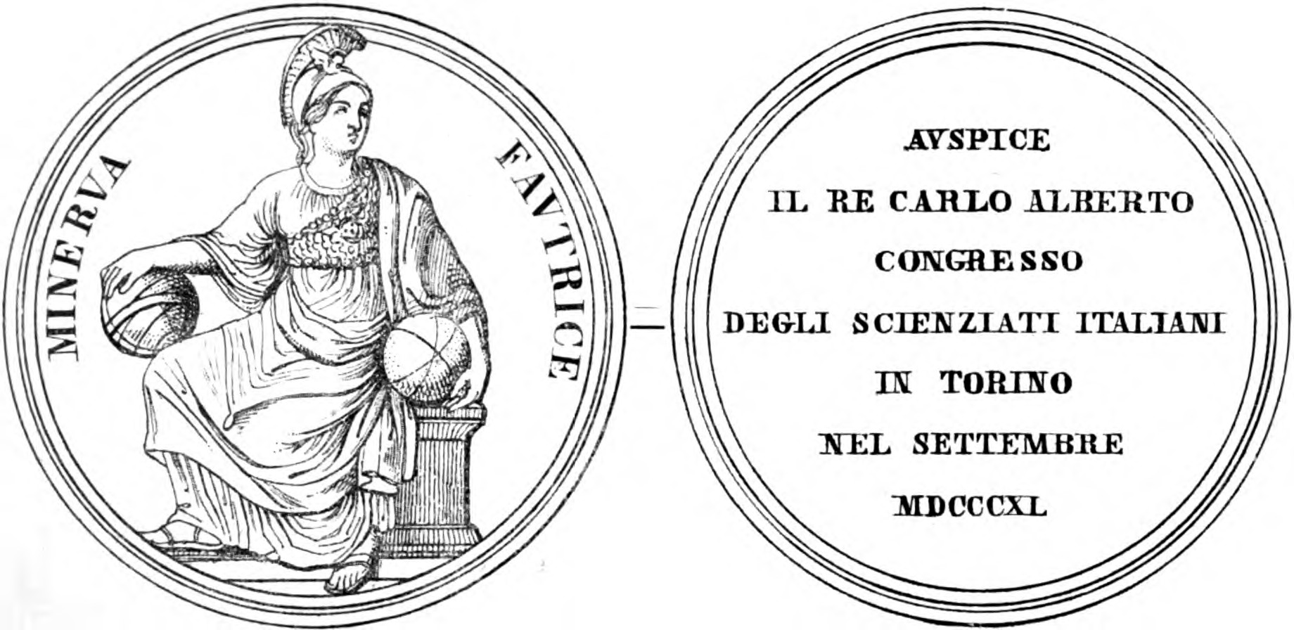 Medaglia per la seconda riunione degli scienziati italiani